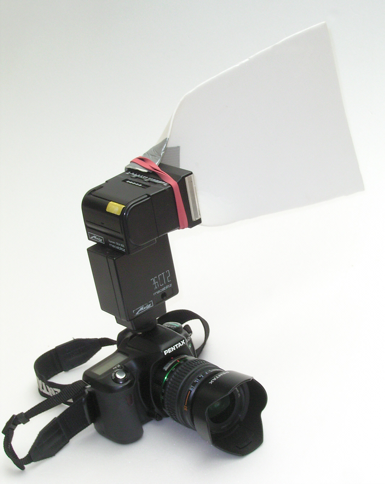 Ein selbstgebastelter Blitzreflektor für einen Aufsteckblitz zur weicheren Ausleuchtung bei Sachaufnahmen / Tabletopfotografie. Materialbedarf: Einmachgummi, ein Stück Klebeband (Tesaband oder Gaffa) zur Verstärkung des Reflektors, der hier aus einem Stück Hartschaumstoff besteht. Eine weiße Pappe dürfte ebenso gut funktionieren.